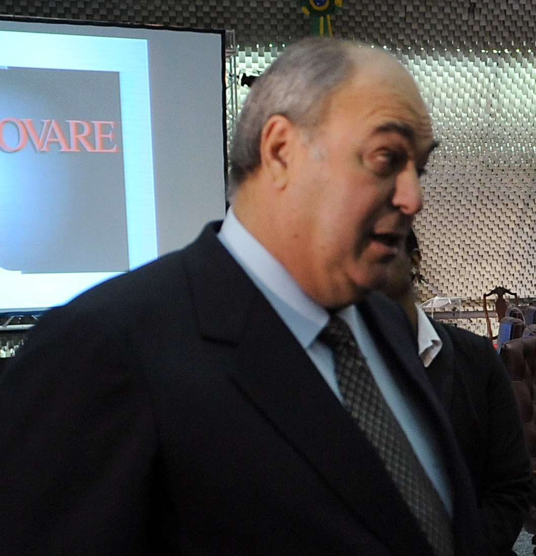 O presidente das Organizações Globo, Roberto Irineu Marinho, após cerimônia de lançamento do 6º prêmio Innovare sobre o tema "Justiça Rápida e Eficaz".